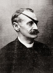 ОРЛОВ Николай Алексеевич Посланник России в Австро-Венгрии 1869-1870